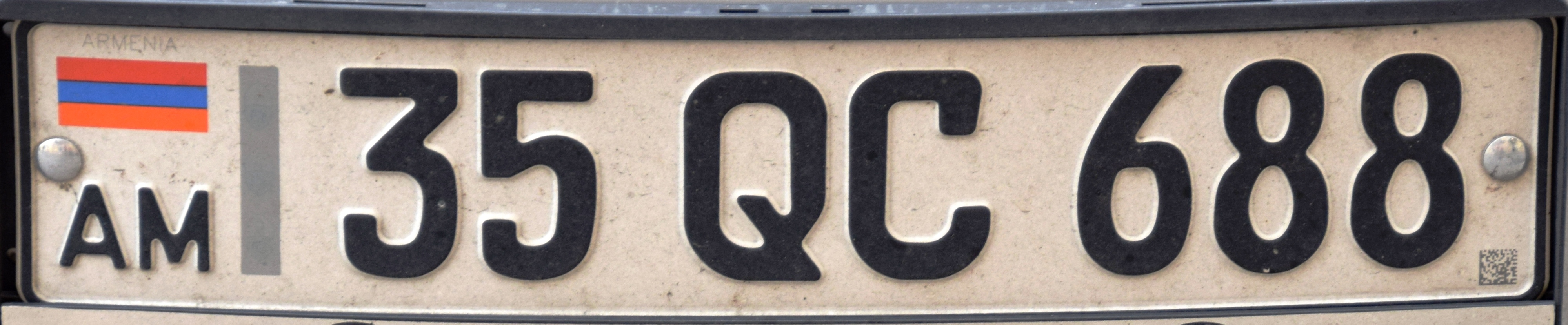 Kentekenplaat uit Armenië